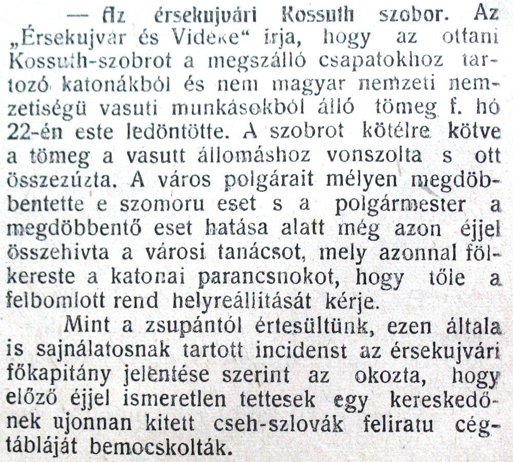 A Kossuth szobor eltávolitásáról Érsekújvárott a Komáromi Lapok 1919-es évfolyamának 19. számában